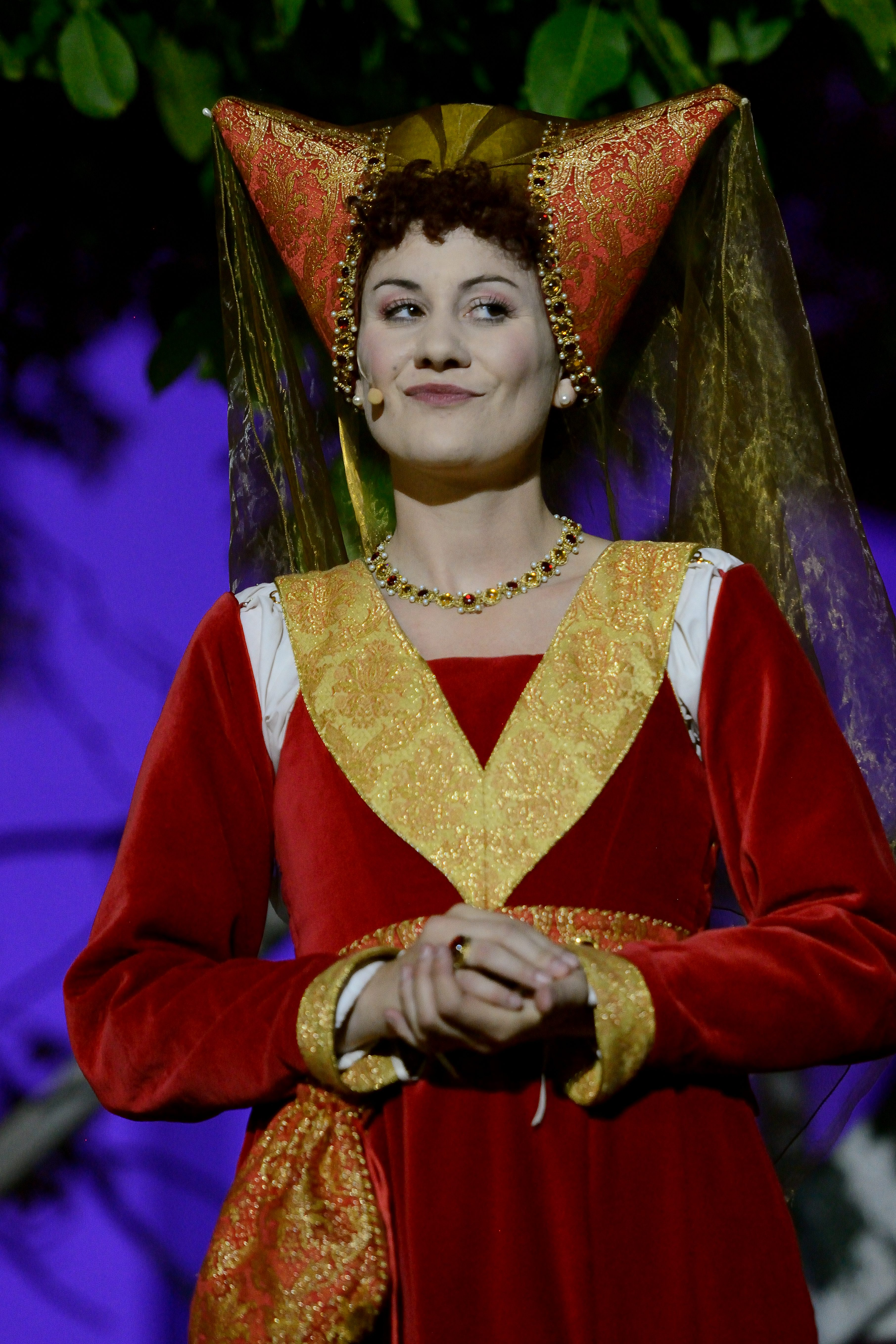 Ramona Treintl als Pfalzgräfin Beatrix bei den Agnes-Bernauer-Festspielen 2019 im Herzogschloss Straubing. (Foto: Ulli Scharrer)